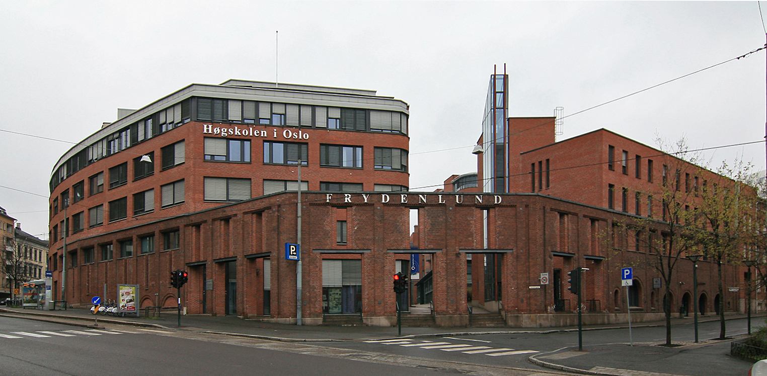 Høgskolen i Oslo, Pilestredet40-52, Oslo. Ombygging av Frydenlund bryggeri, kombinert med nybygde hus. Arkitekt: 4 B Arkitekter, 1992-98.